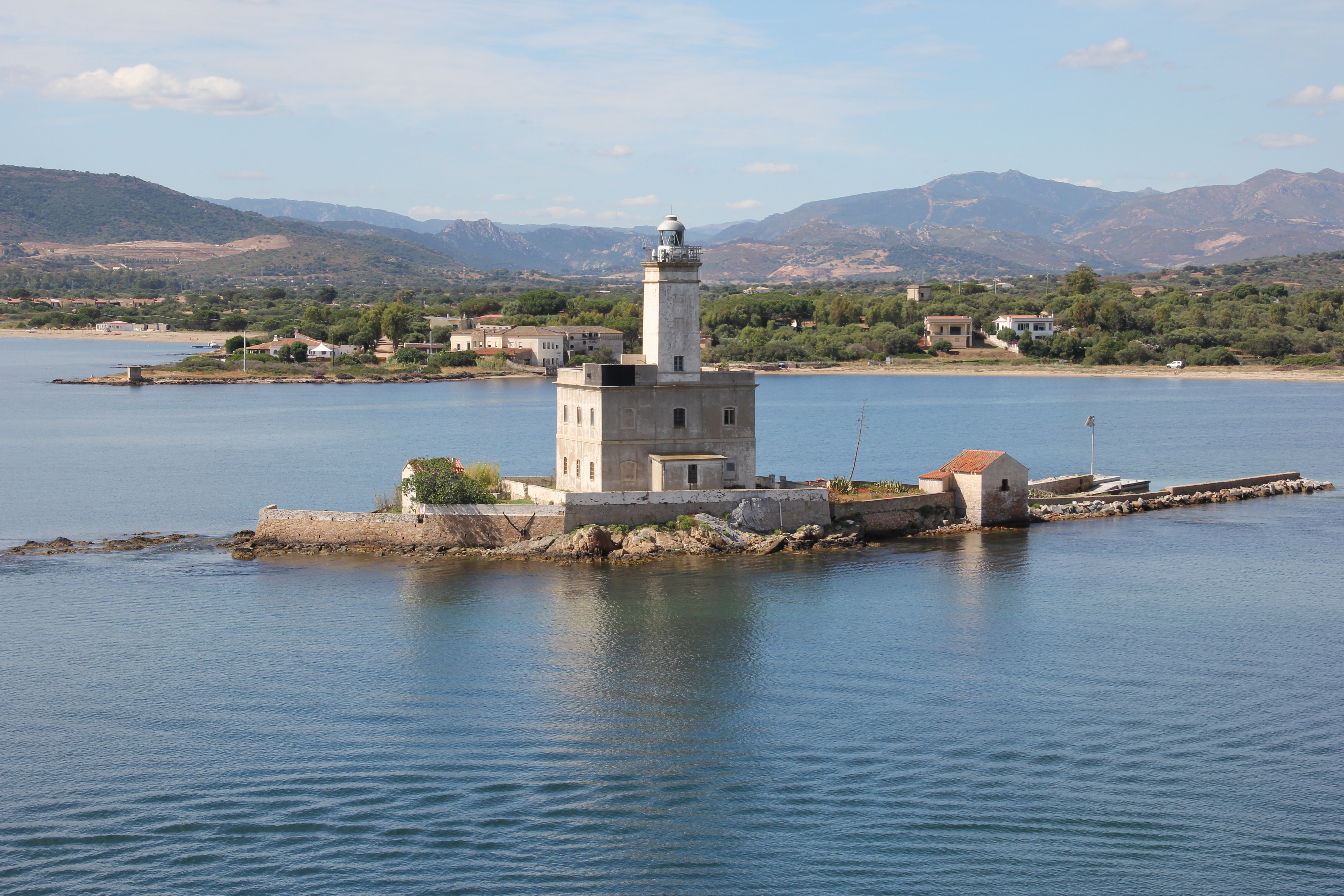 Olbia, isola di Molarotto